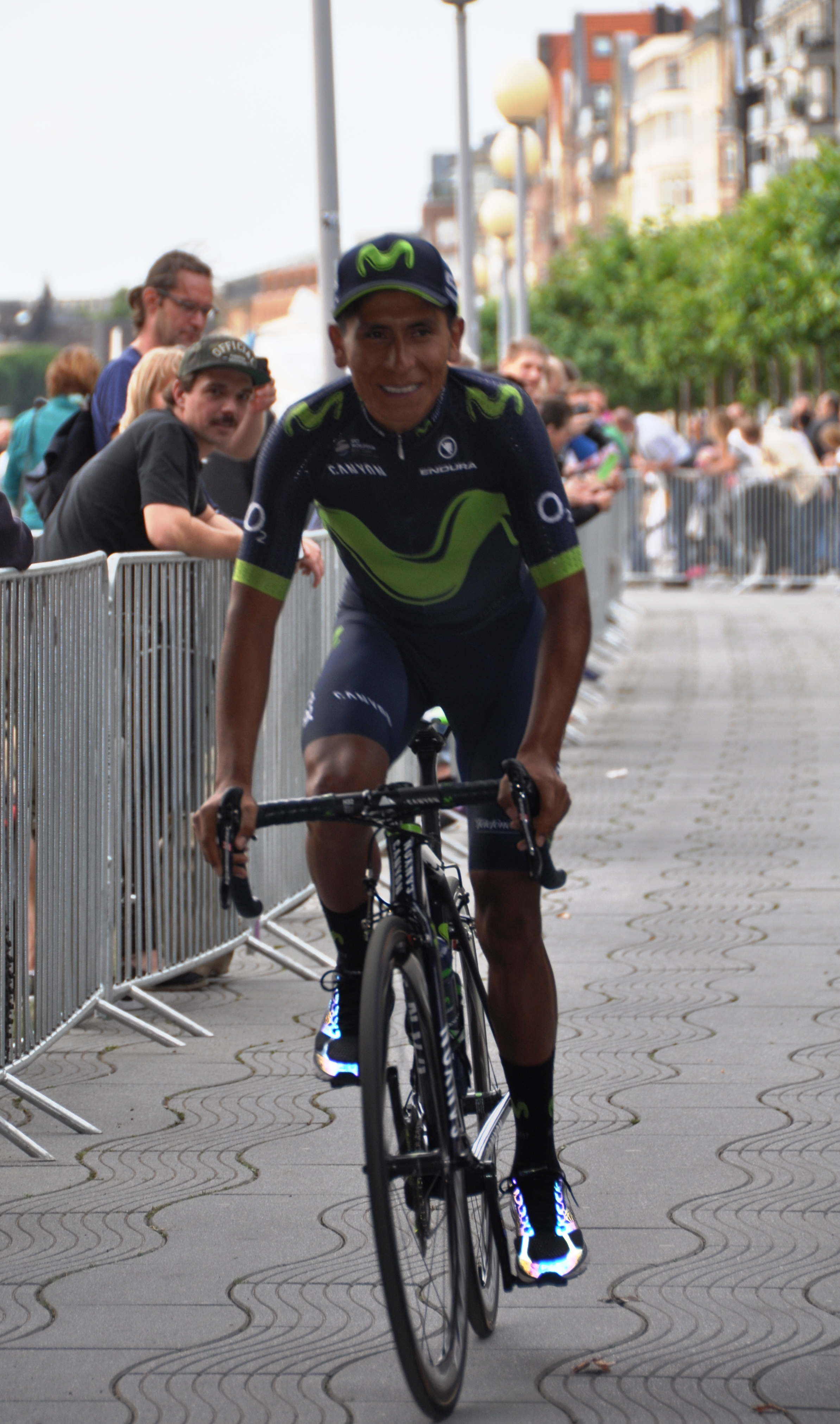 Nairo Quintana, kolumbianicher Radrennfahrer